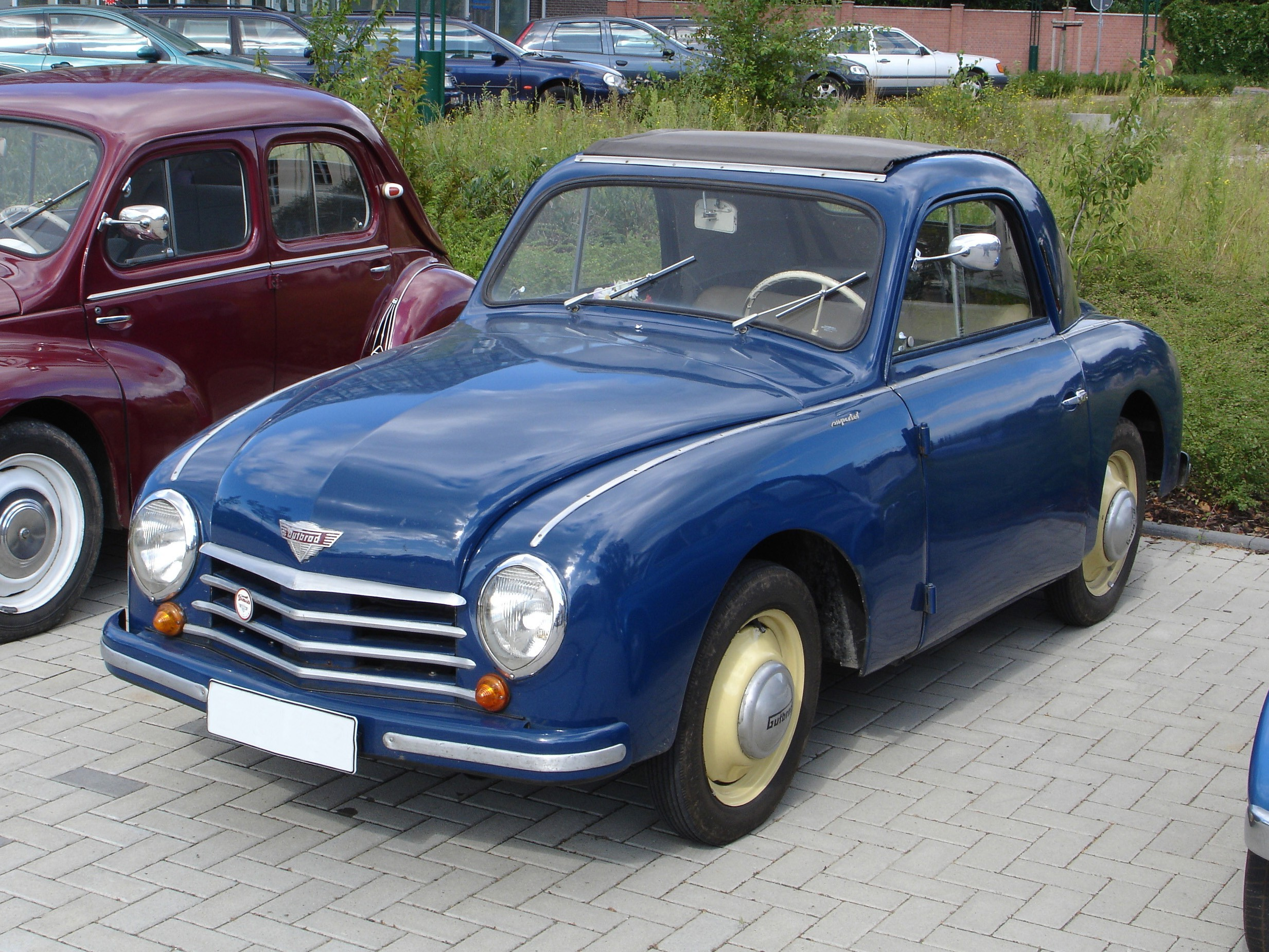 Gutbrod Superior Limousine der 50er Jahre